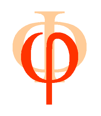 Greek letter